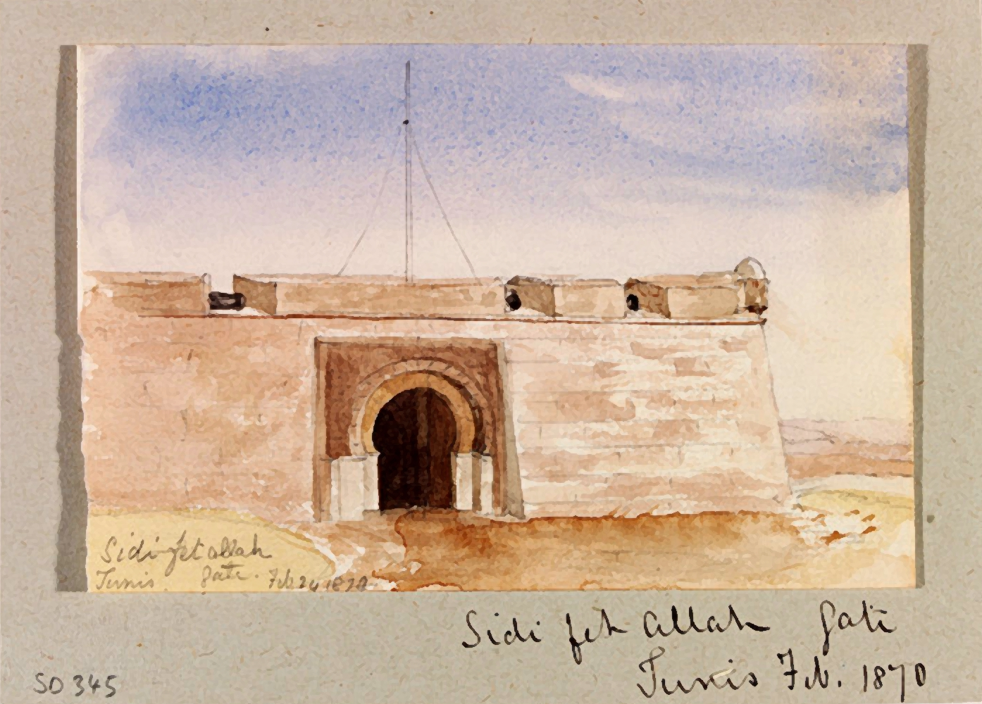 Sidi Fathallah gate in Tunis, Tunisia